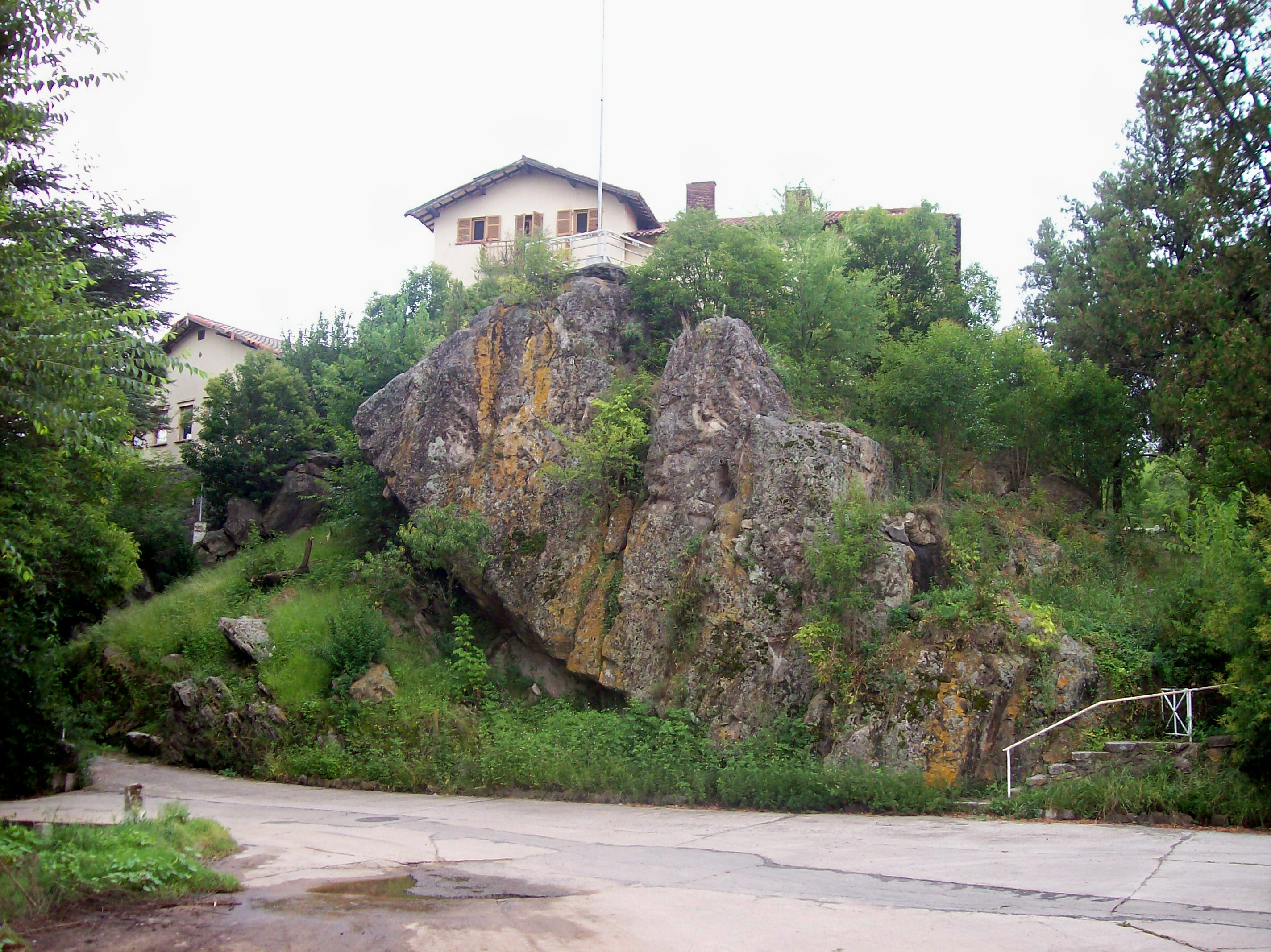 Hotel sobre un peñón, en el extremo final NE de la calle Centenera, barrio de San Antonio, en Valle Hermoso, Pcia. de Córdoba, Argentina. Foto tomada de S a N